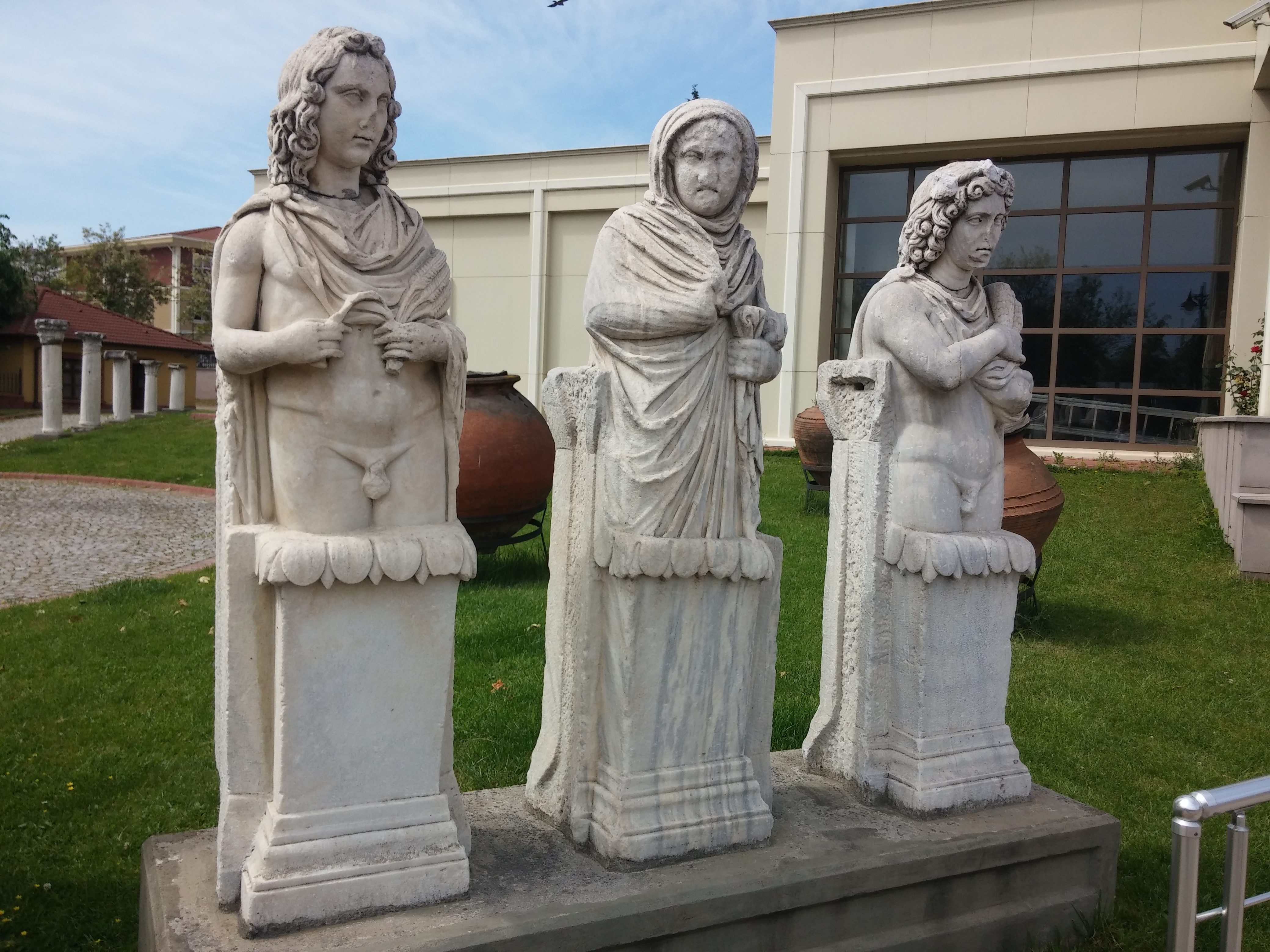 Kocaeli Arkeoloji ve Etnografya Müzesinin bahçesinde sergilenen Roma dönemi heykel grubu. Heykeller soldan sağa yaz, kış ve sonbahar mevsimlerini temsil etmektedir.